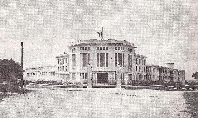 Lycée Jean Zay Thiers façade art-déco